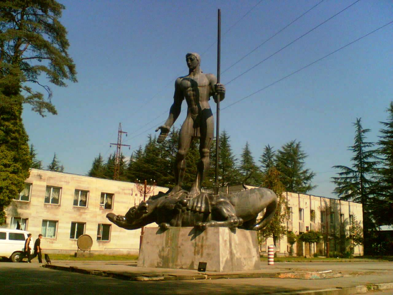 ჩხოროწყუ, დაბა საქართველოში.